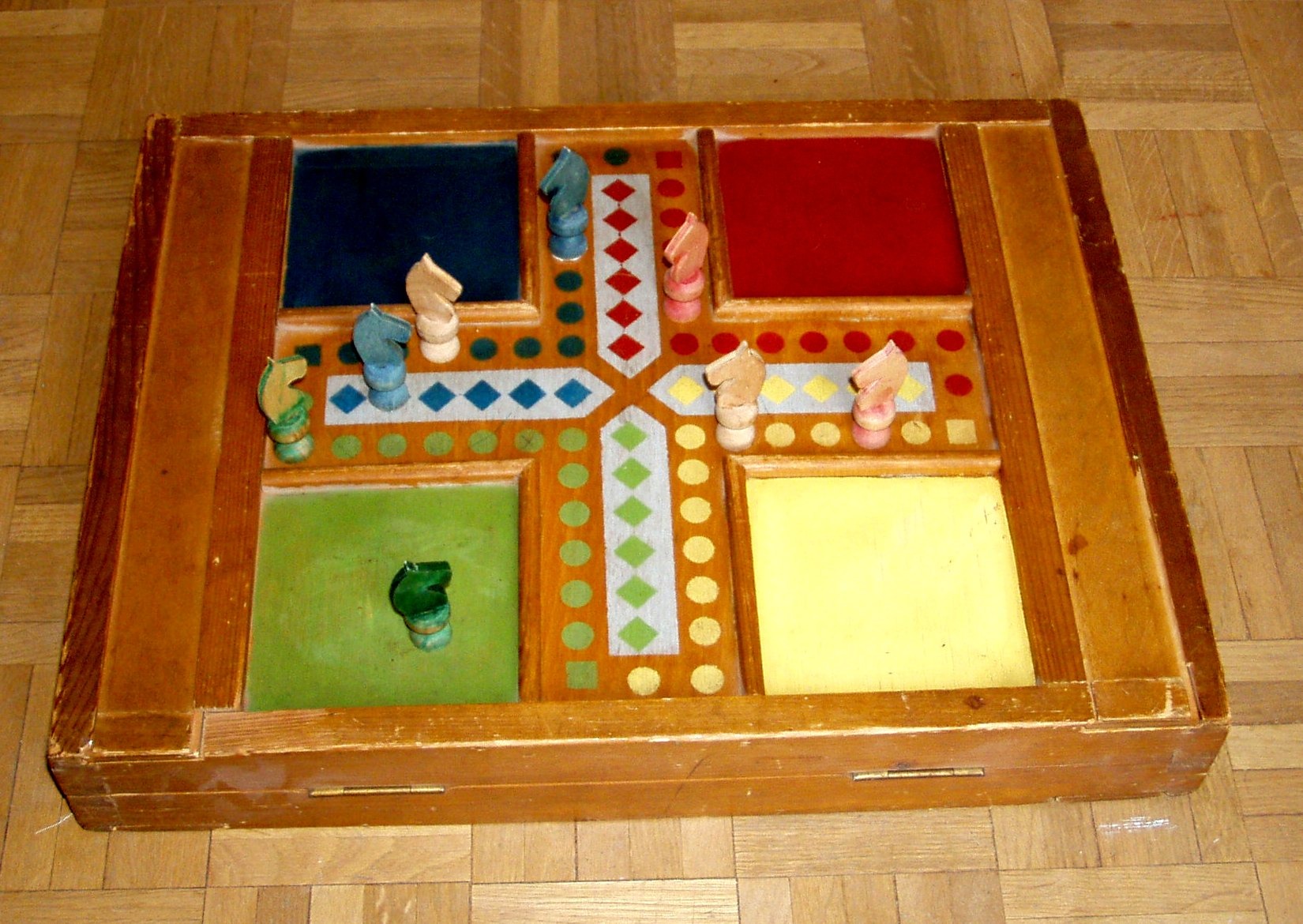 Un jeu de petits chevaux, version française du Ludo